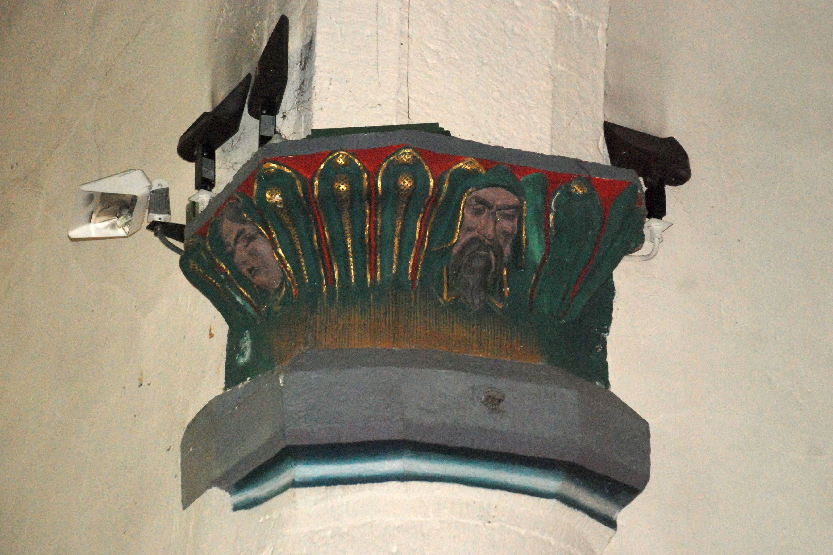 Belgique - Wallonie - Église Saints-Hermès-et-Alexandre de Theux